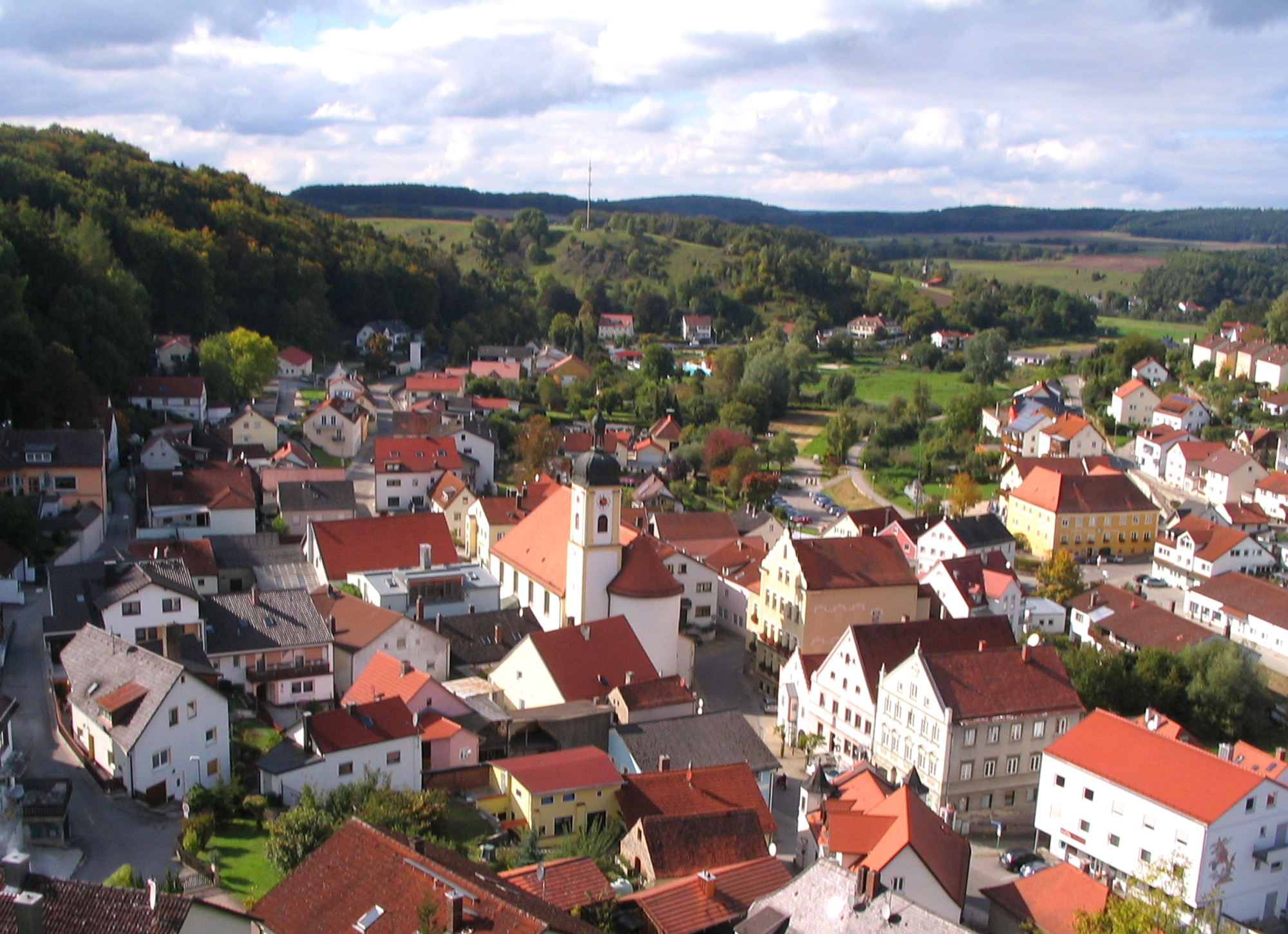 Altmannstein im Schambachtal, Landkreis Eichstätt, Oberbayern